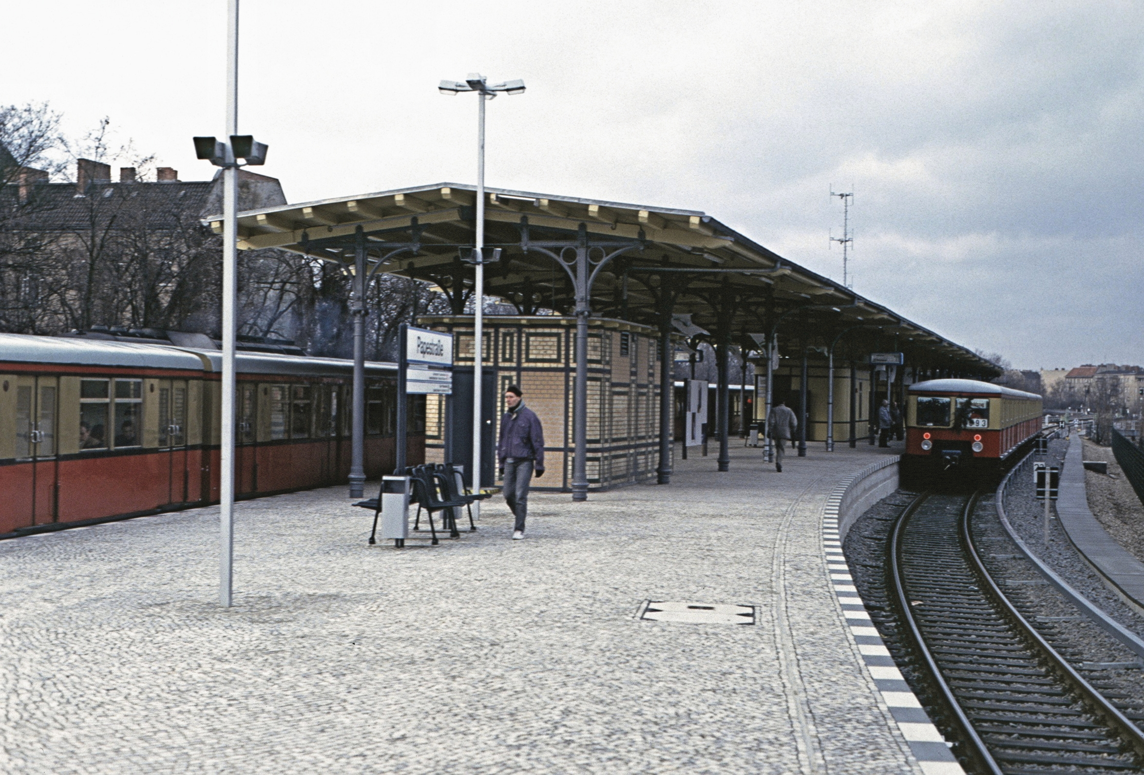 Berlin Ringbahnhof Papestraße